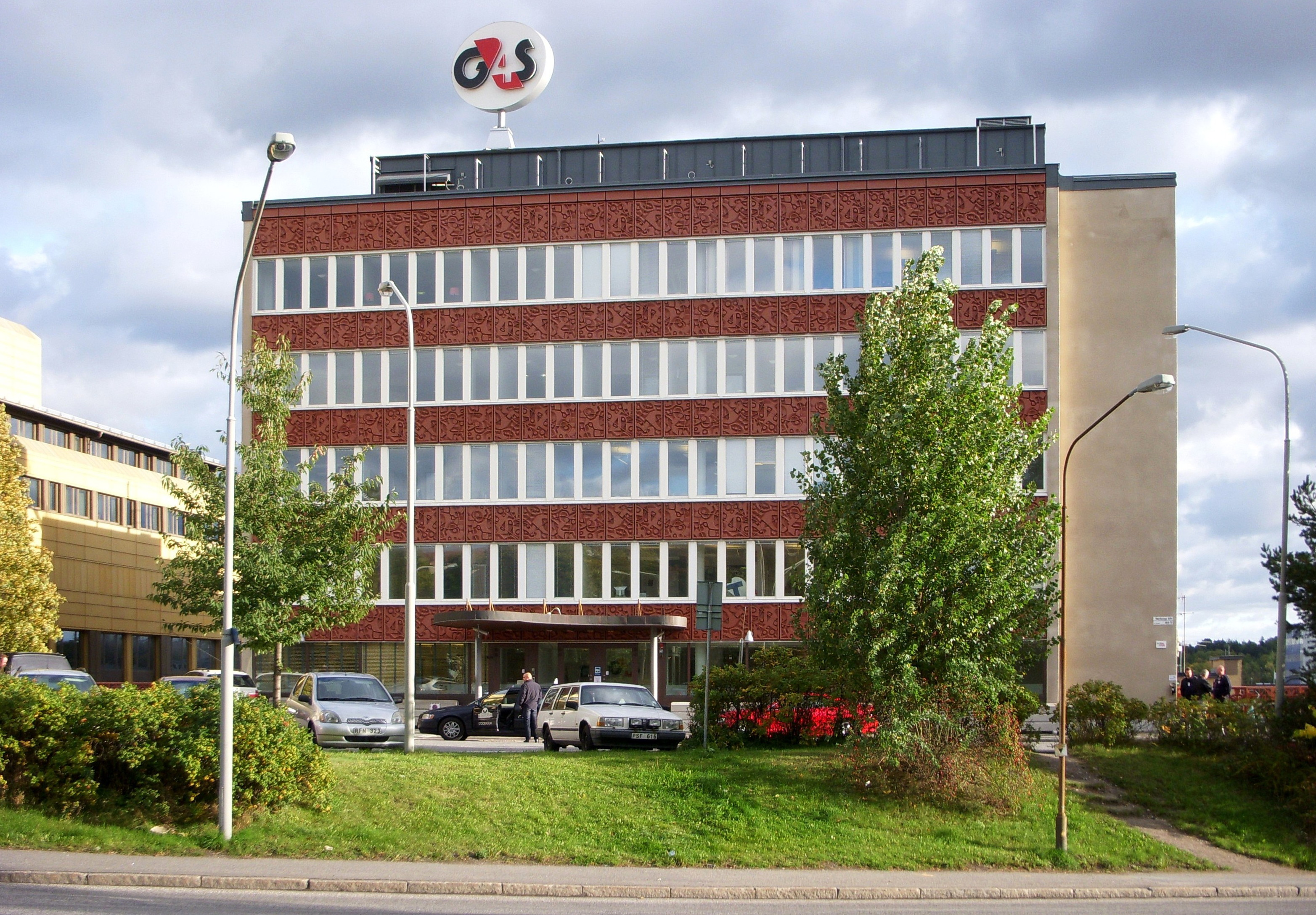 Före detta G4S byggnad i Västberga, Stockholm, Vretensborgsvägen 32, Västberga allé 11, byggd 1957 - 1967, Georg Scherman (Arkitekt)